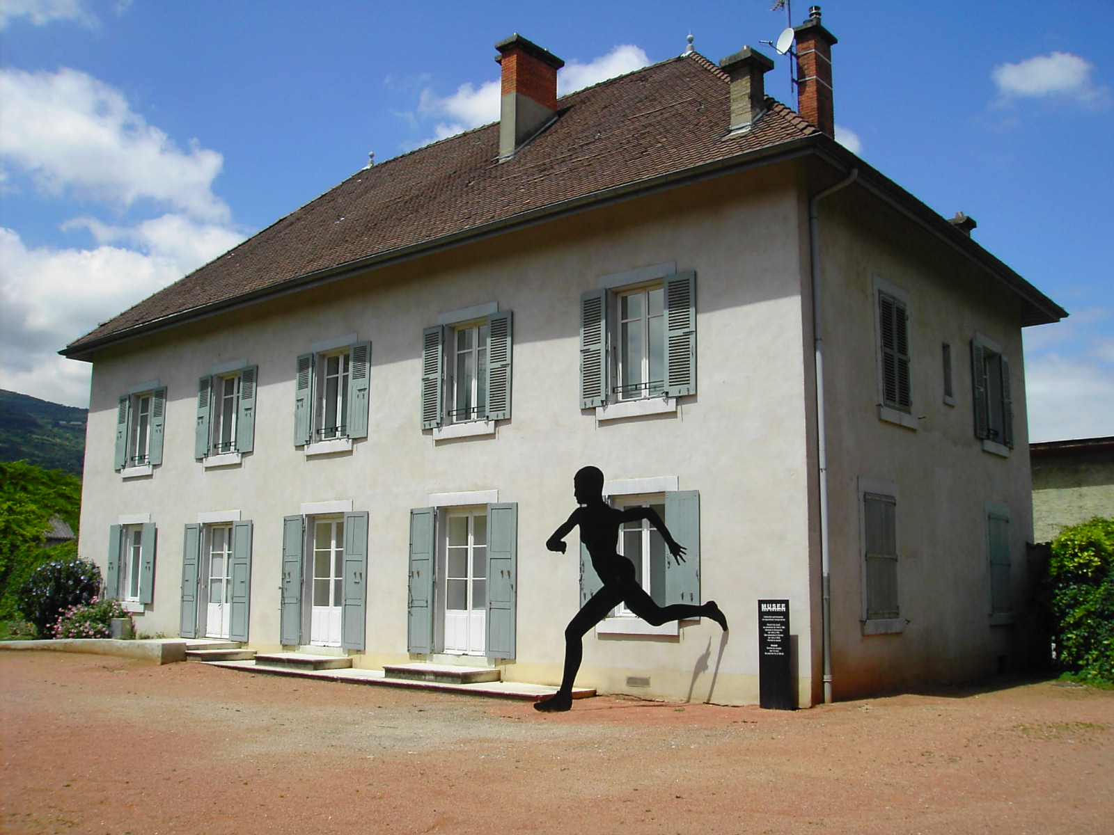 Musée Géo-Charles - Echirolles